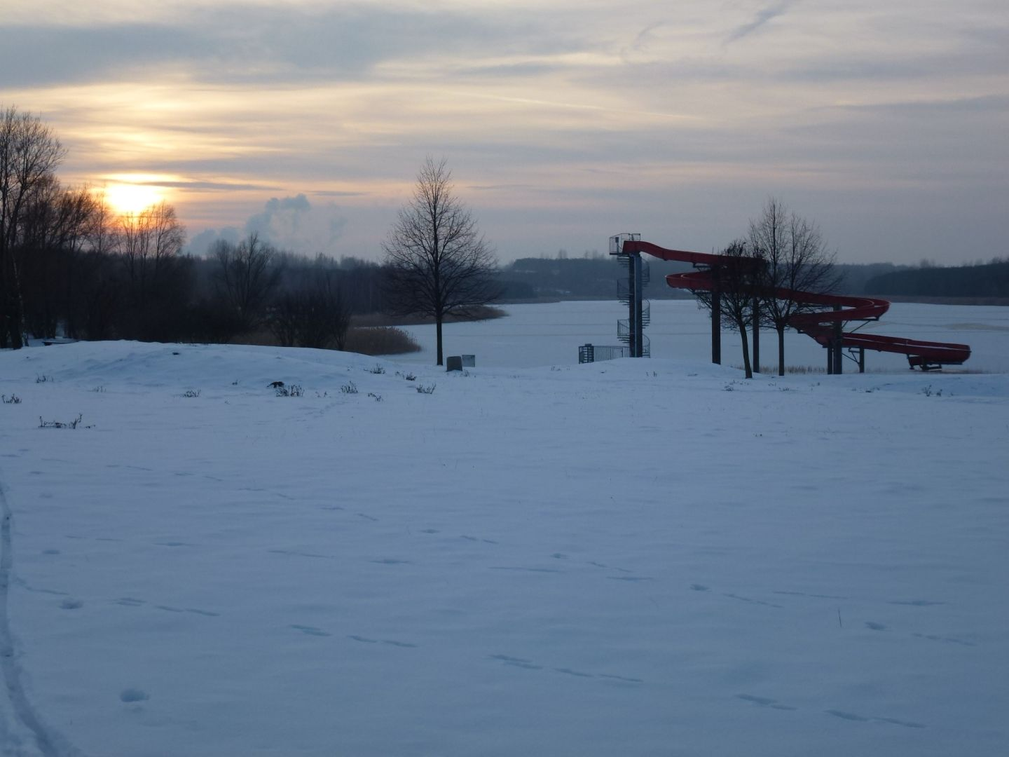 Vereister Mondsee bei Hohenmölsen